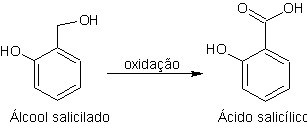 Oxidação do álcool salicilado em ácido salicílico.